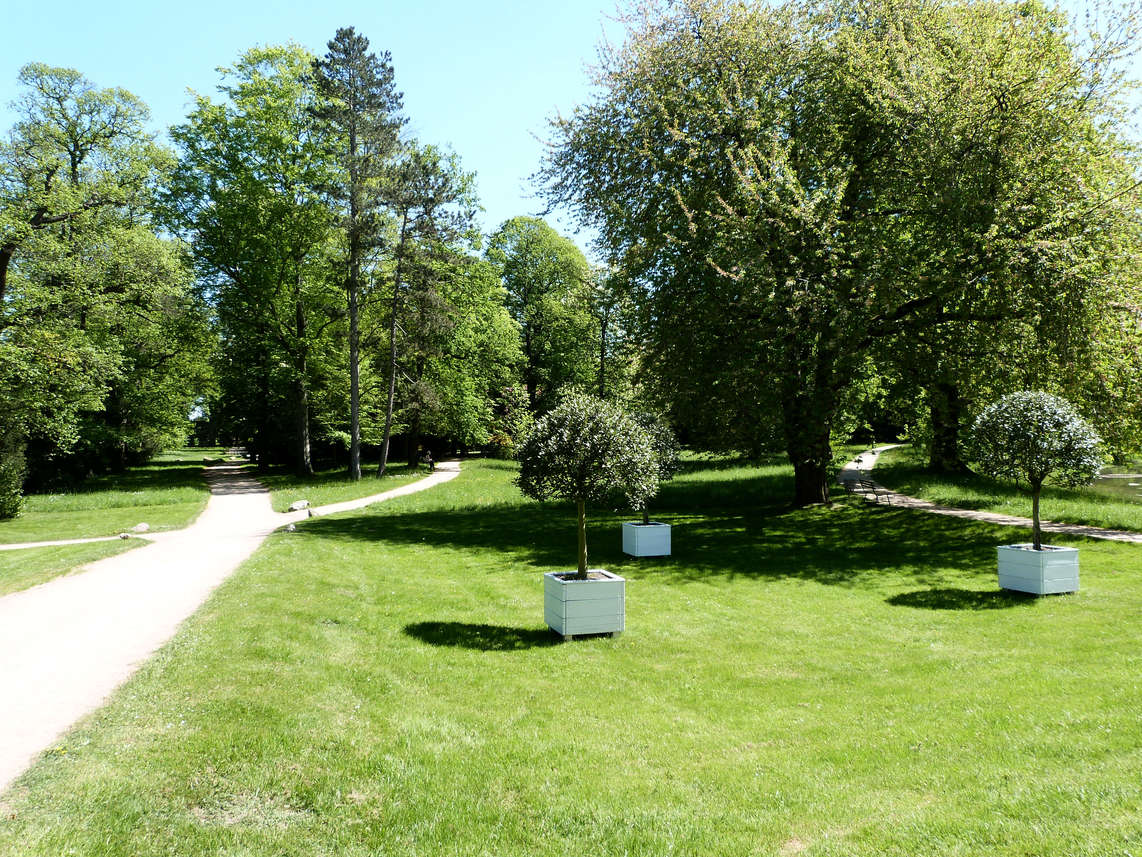 Park Luisium, Dessau-Waldersee